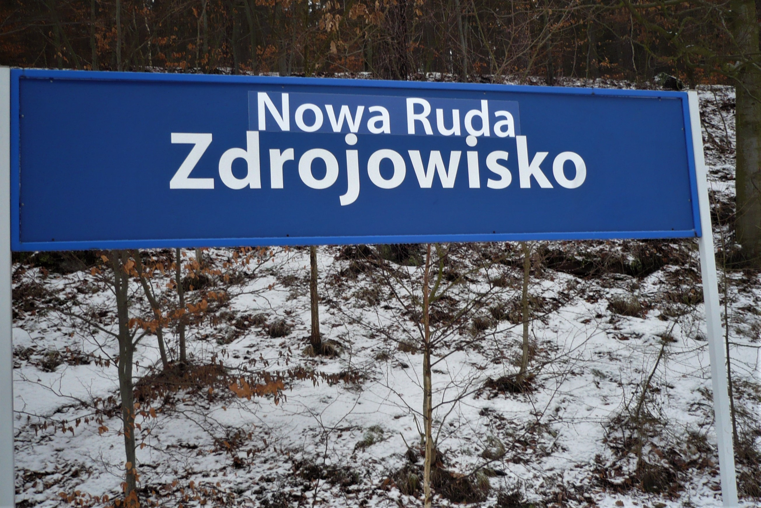 Nowa Ruda - Zdrojowisko